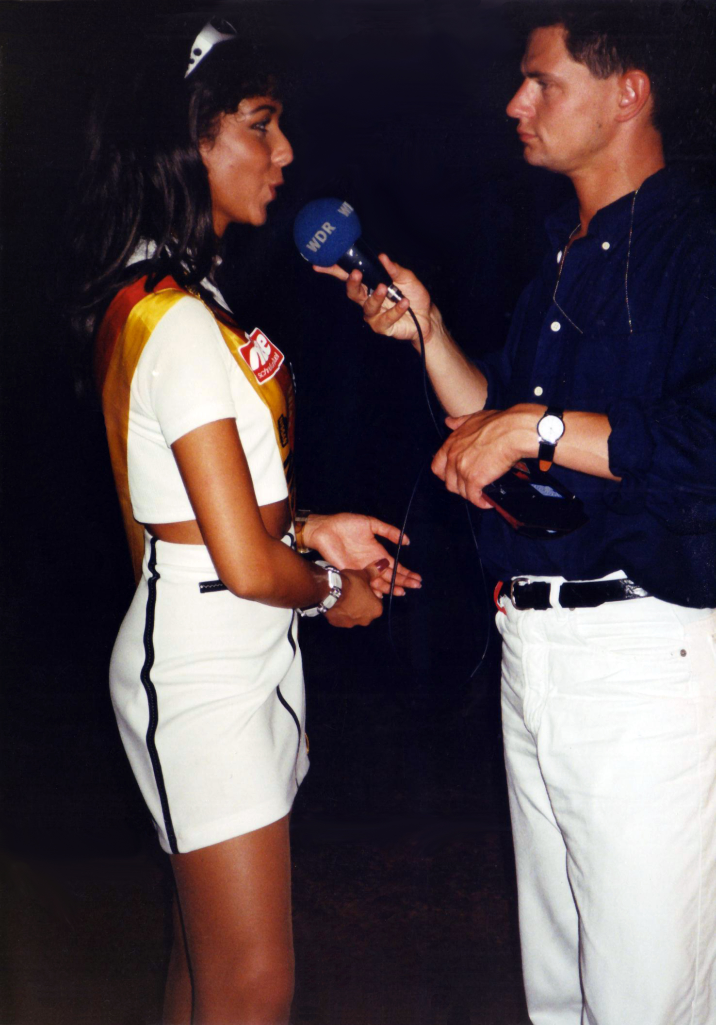 Ingo Hoppe mit Yasemin Mansoor